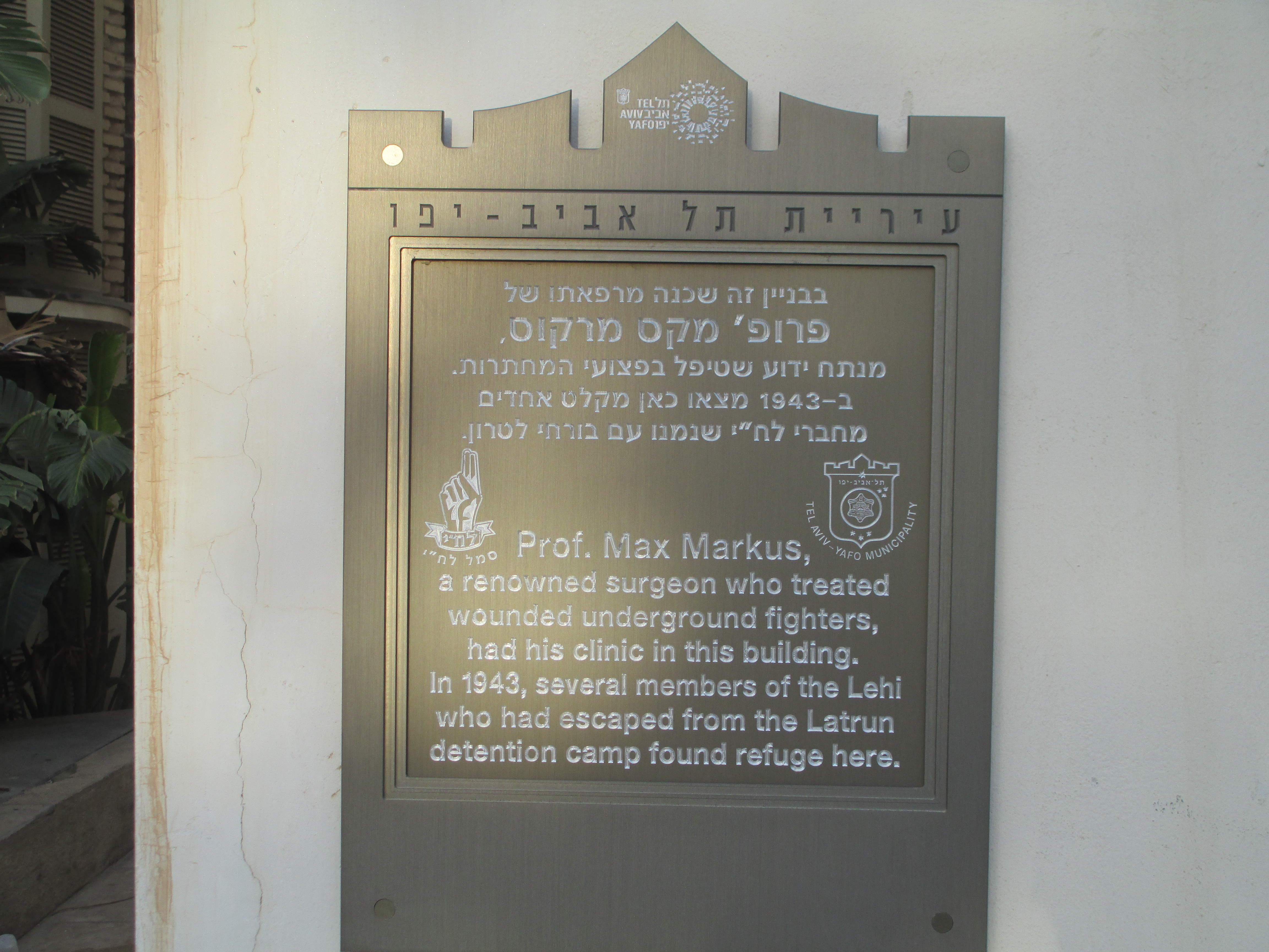 לוחית זיכרון על הבית שבו הייתה מרפאתו של פר' מרקוס שבה הסתתרו בורחי לח"י מלטרון בנובמבר 1943